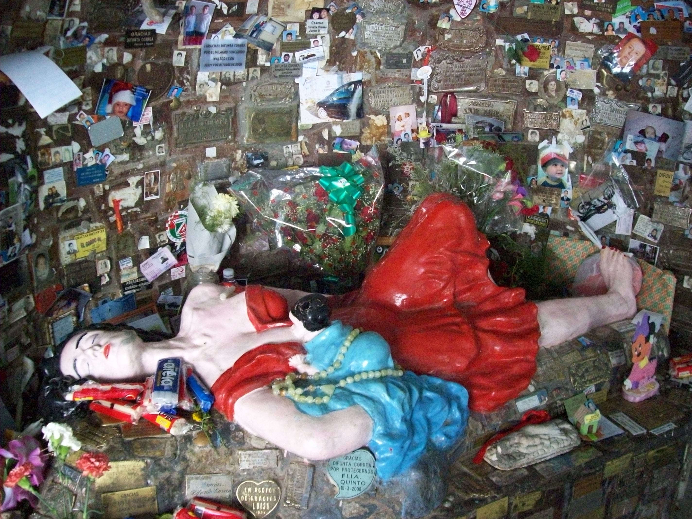 Imagen de la Difunta Correa en el Santuario del mismo nombre, en Vallecito, Departamento Caucete, Provincia de San Juan, Argentina.